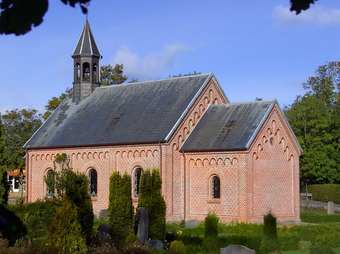 fra sydøst